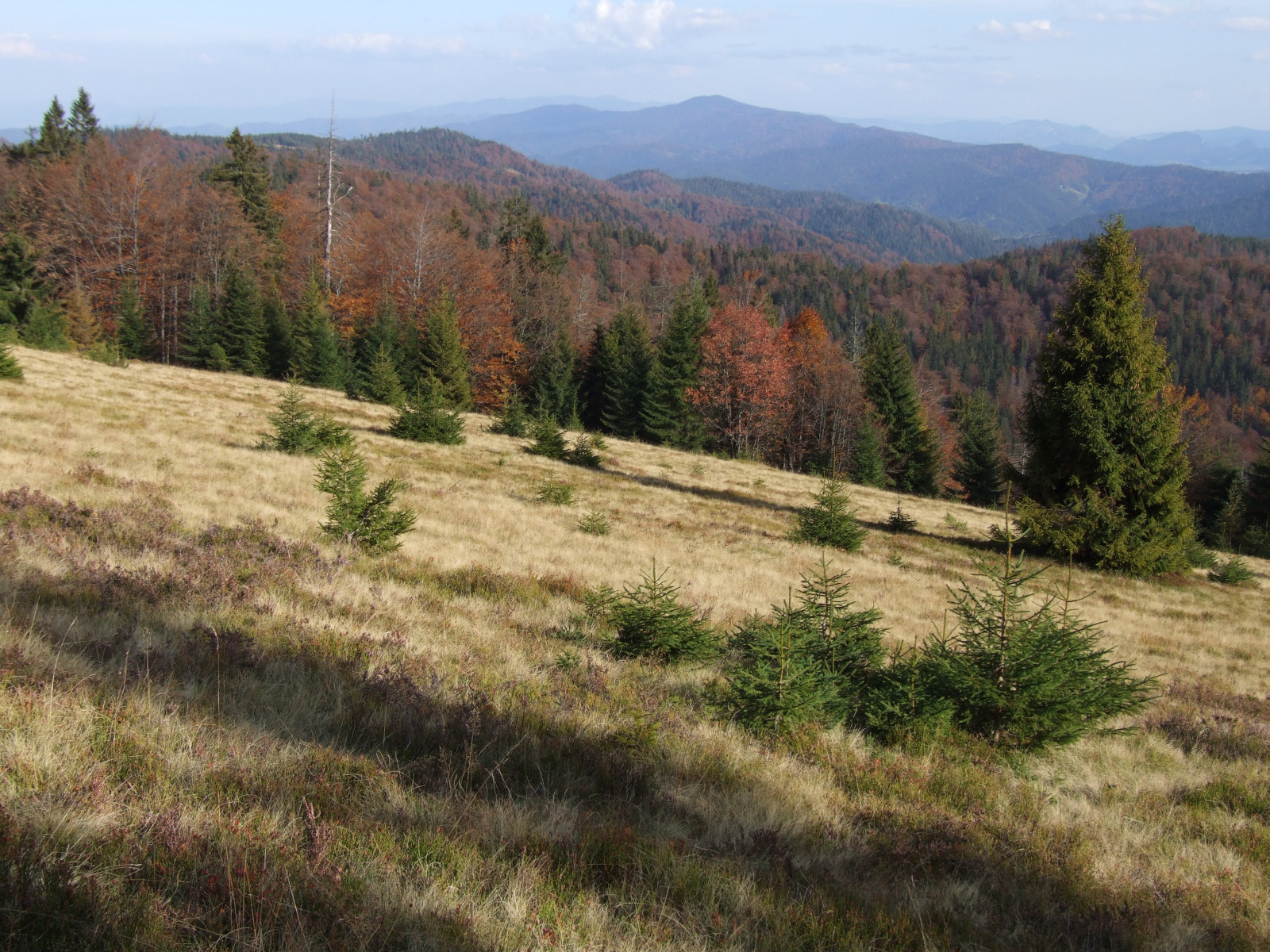 Polana Młyńska (Gorce)